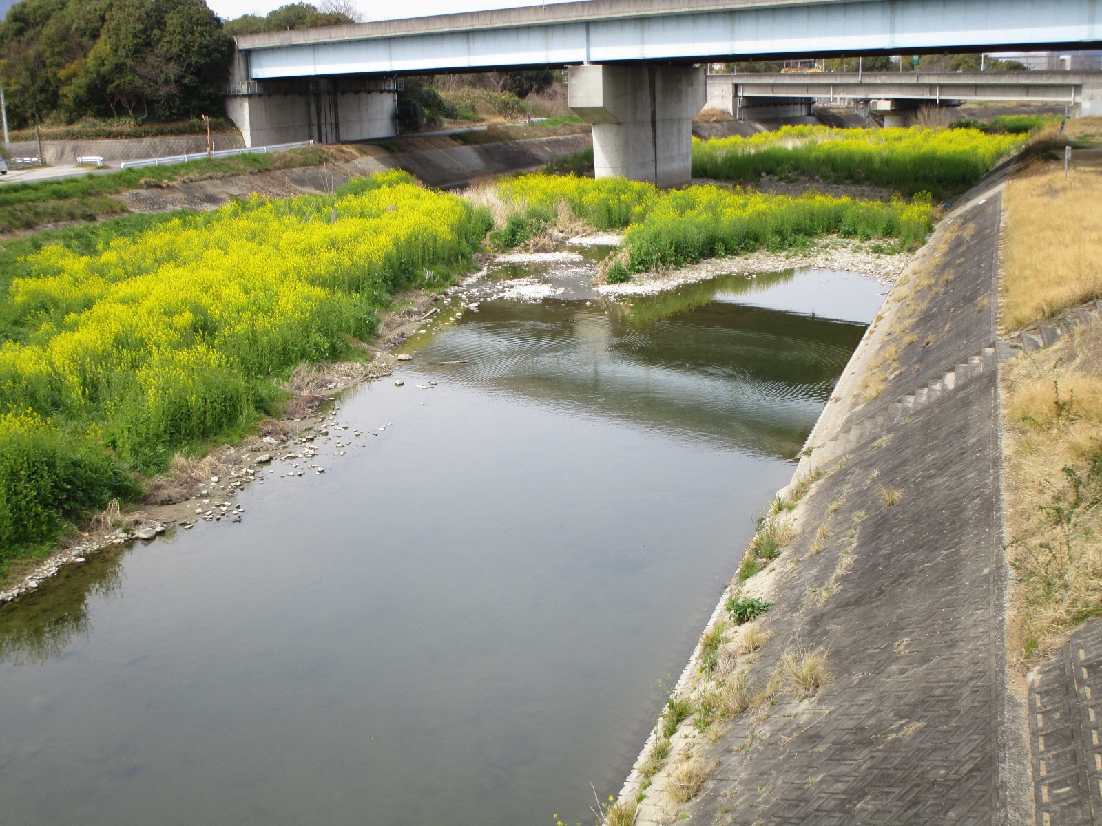 金倉川（香川県、善通寺大橋より撮影）